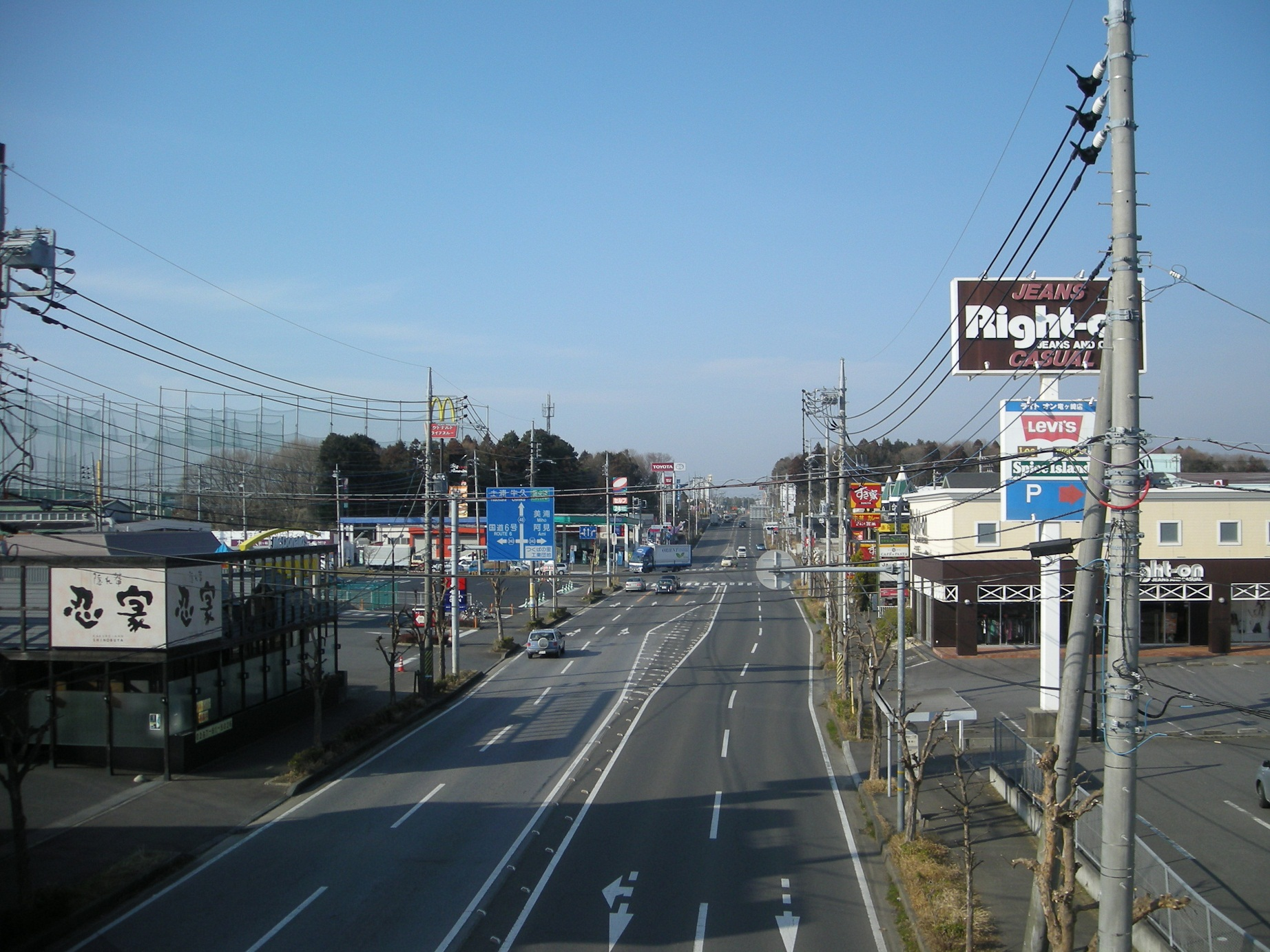 茨城県道48号土浦竜ヶ崎線（茨城県龍ケ崎市）